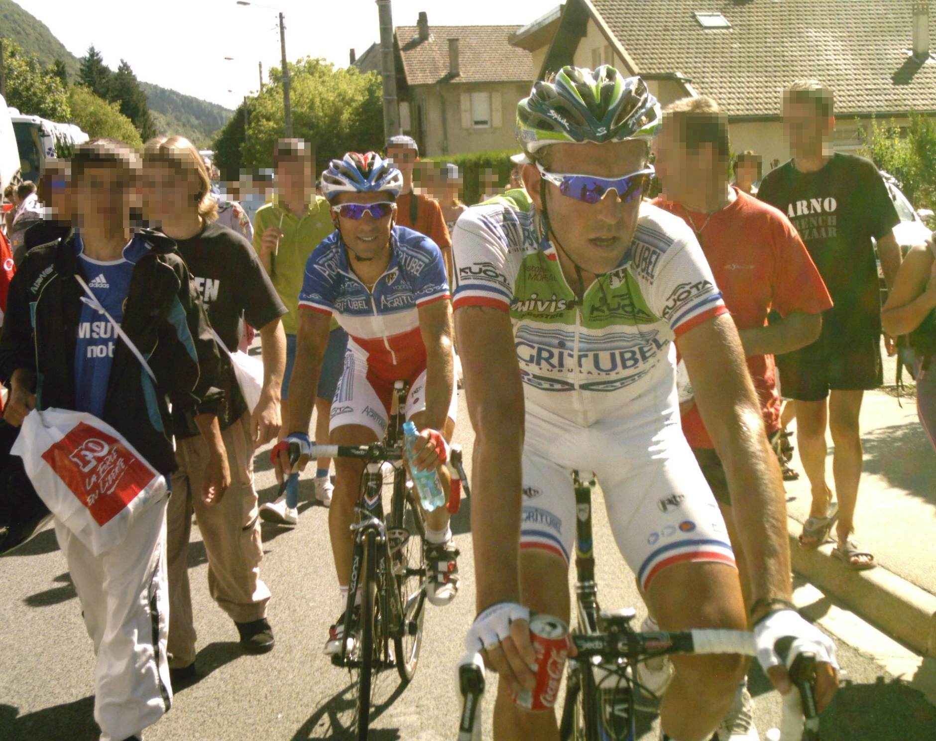 Nicolas Vogondy et Christophe Moreau à l'arrivée de la première étape du Tour de l'Ain à Montréal-la-Cluse.